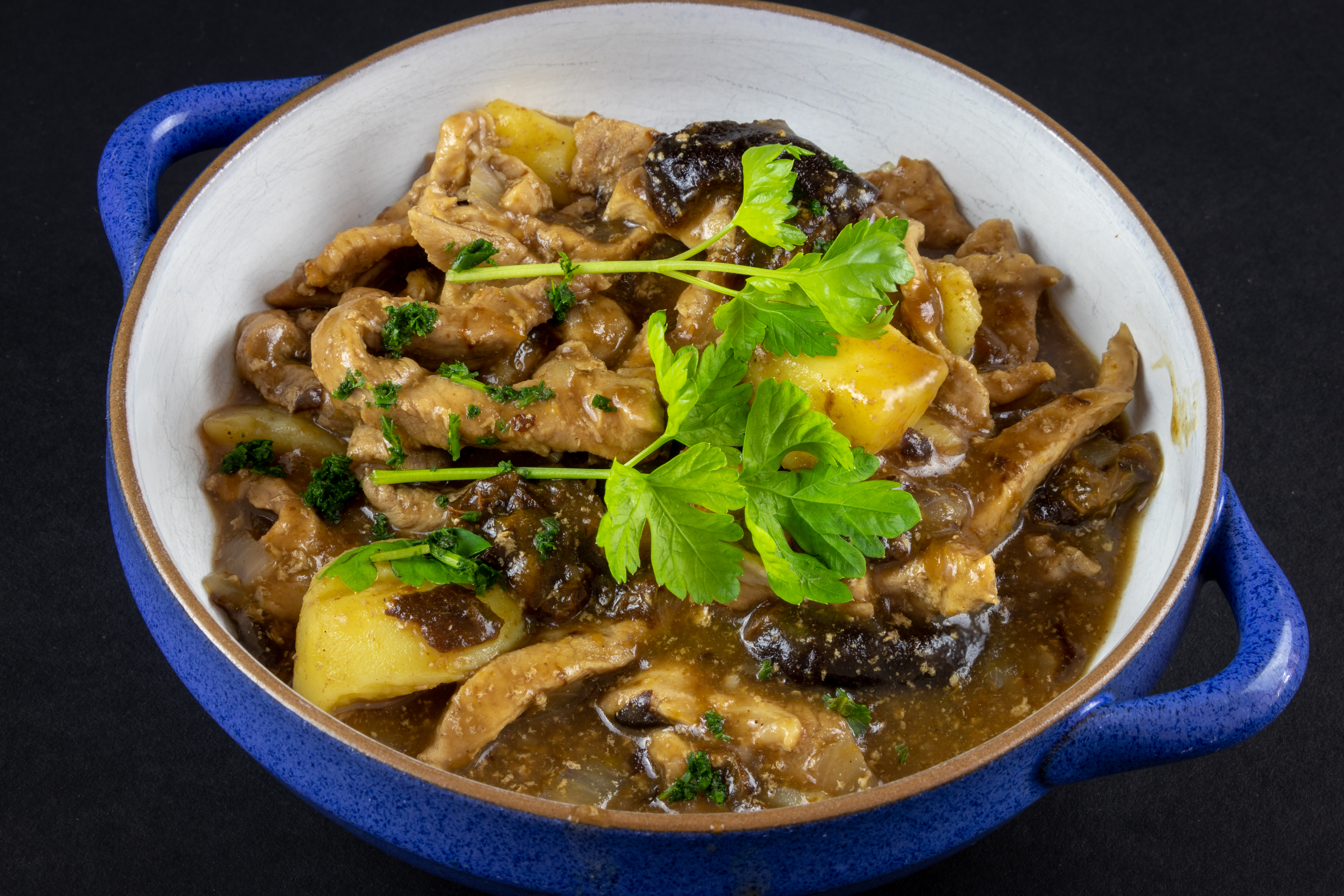 Blutgemüse